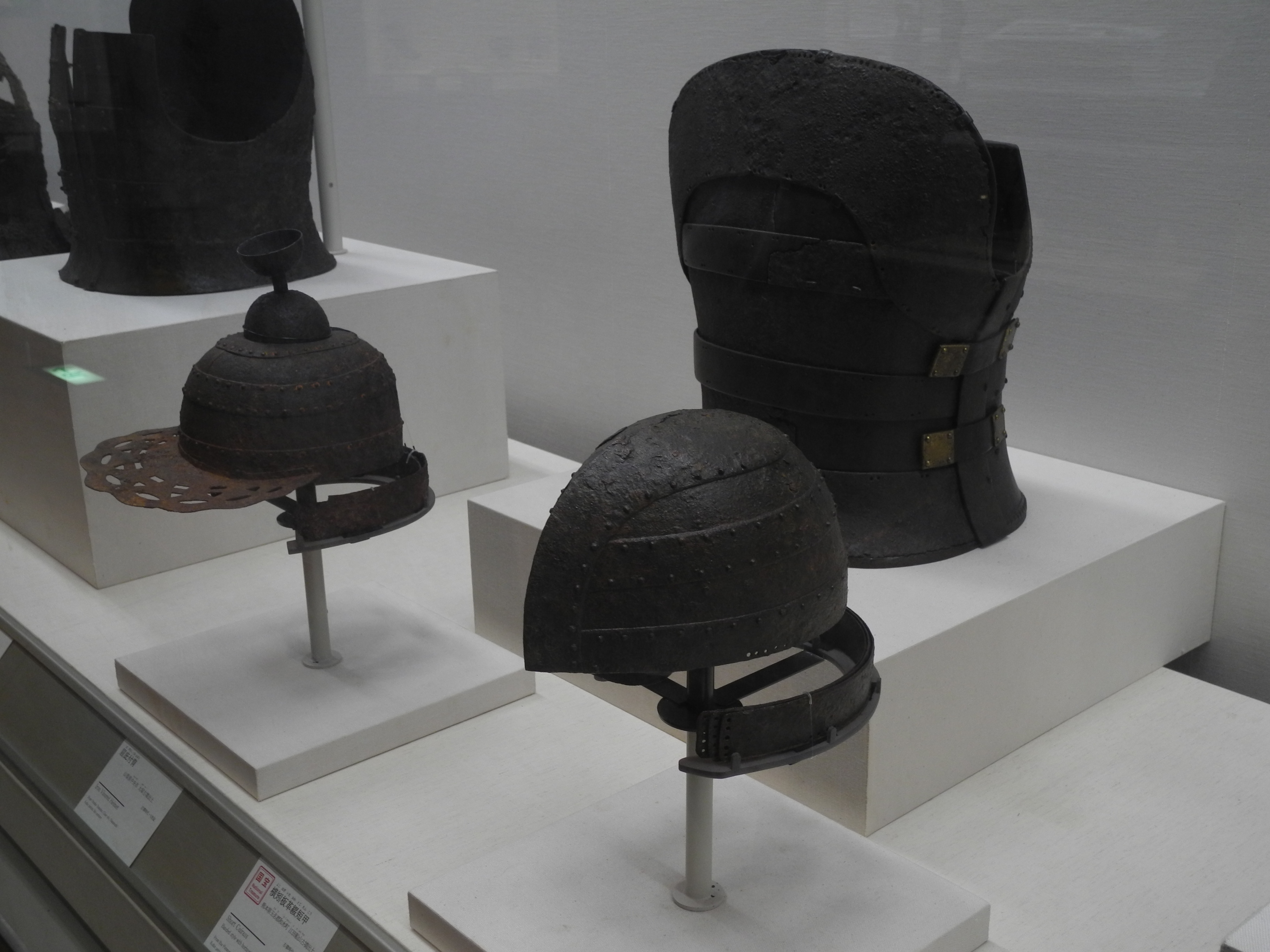 Танко. Токийский национальный музей.